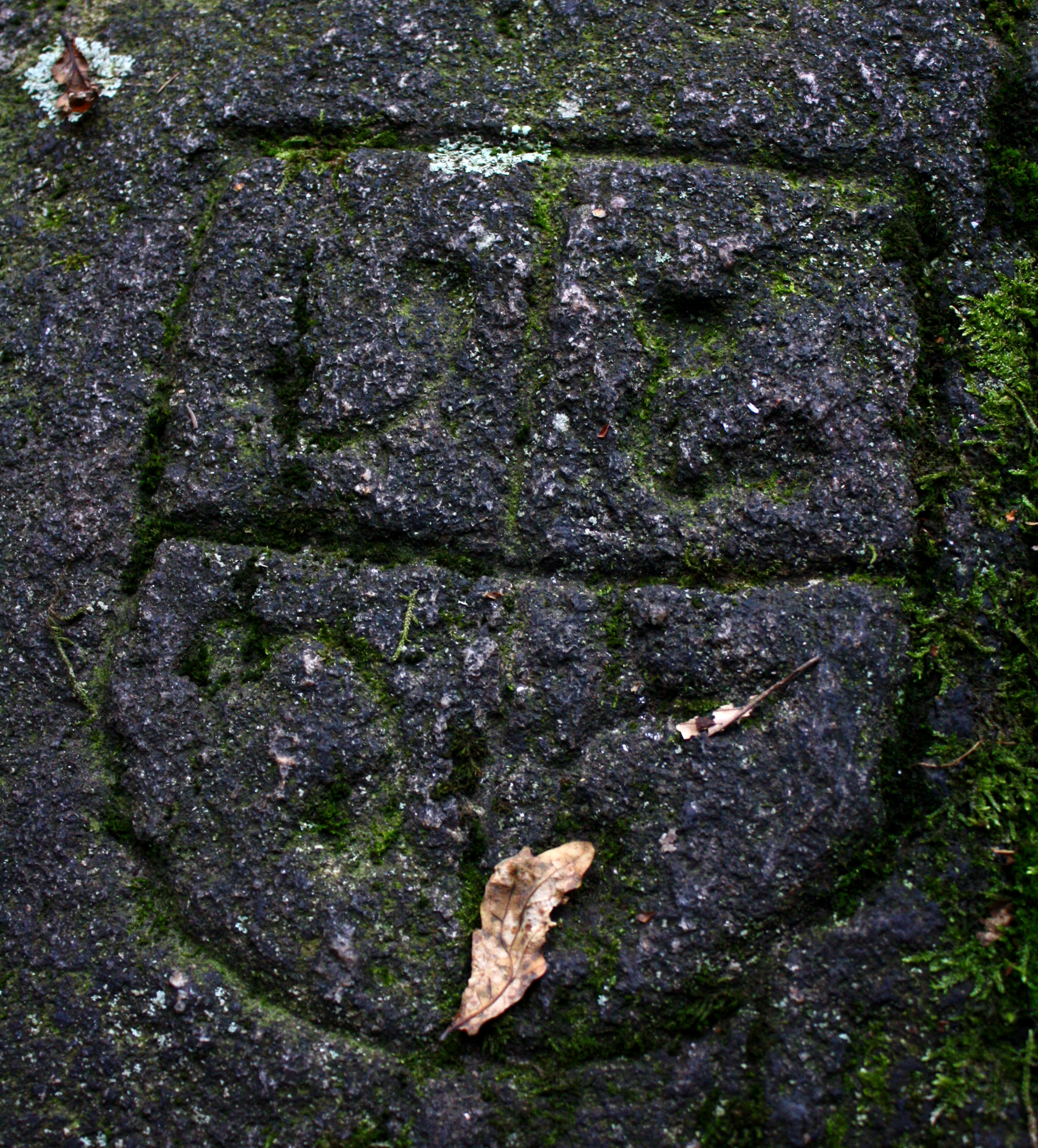 Paläontologische Felsritzung auf einem Kultstein. Wahrscheinlich eisenzeitlich (dargestellte Torques, Verwitterungsgrad).